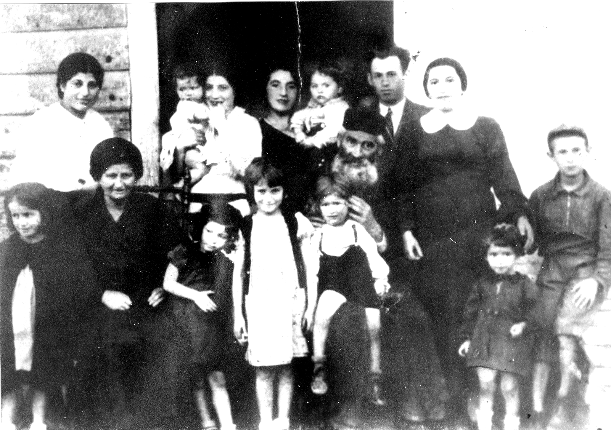 Familie von Kalmen Wewryk, Kalmen Wewryk war der einzige Überlebende